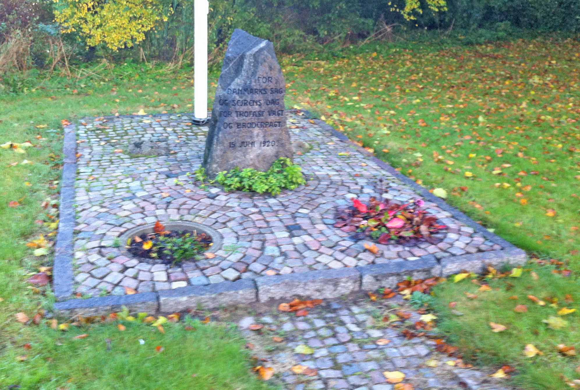 Genforeningssten i Haldrup